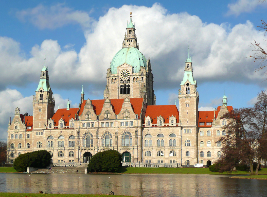 Maschpark und Maschteich, Gartenfassade Neues Rathaus Hannover